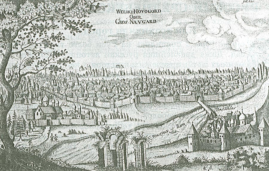 Вид Великого Новгорода в 17 веке